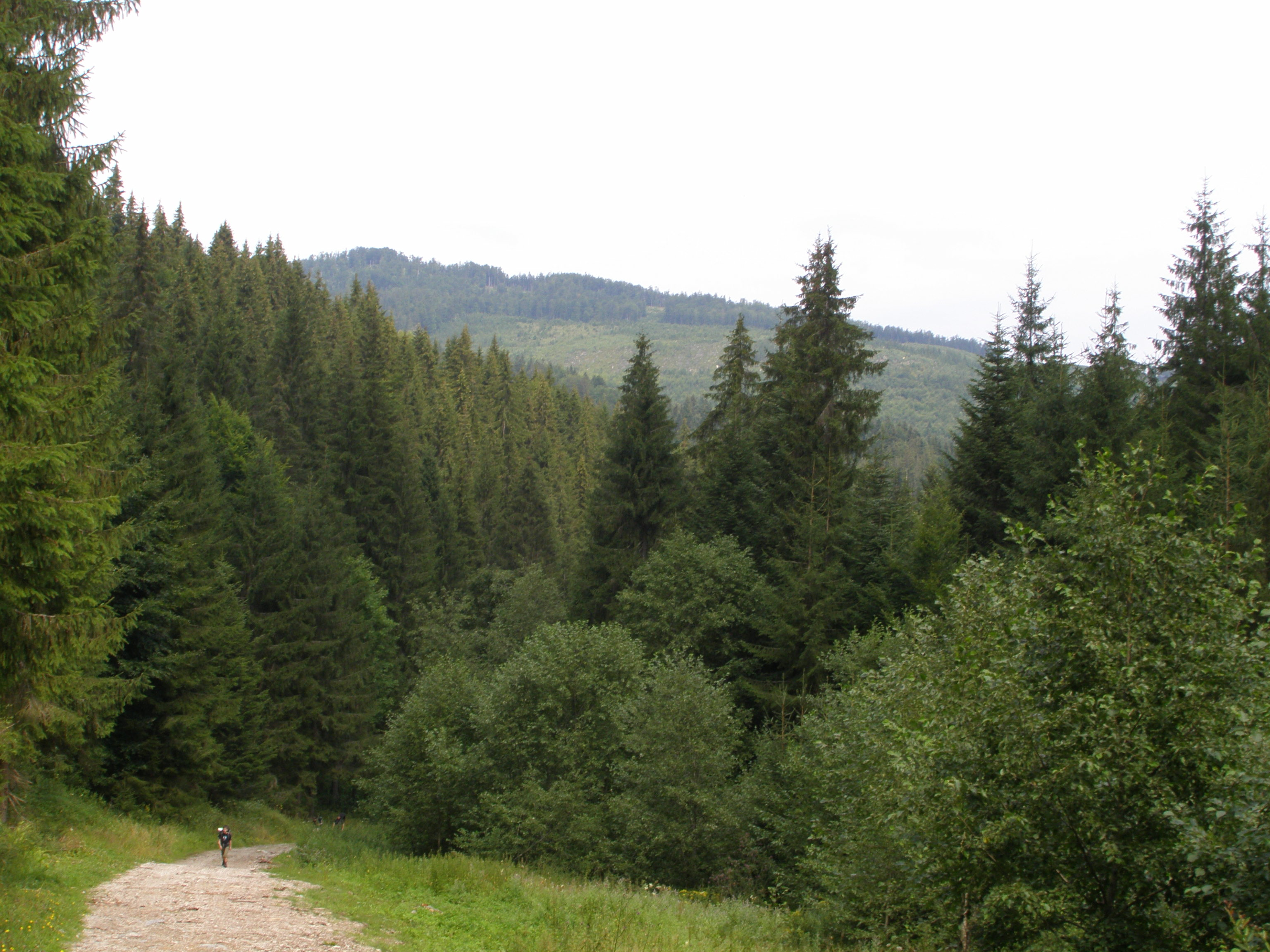 Slovenské rudohoří, Veporské vrchy, Balocké vrchy, cesta na západním úbočí vrcholu Gazdov (1009 m)